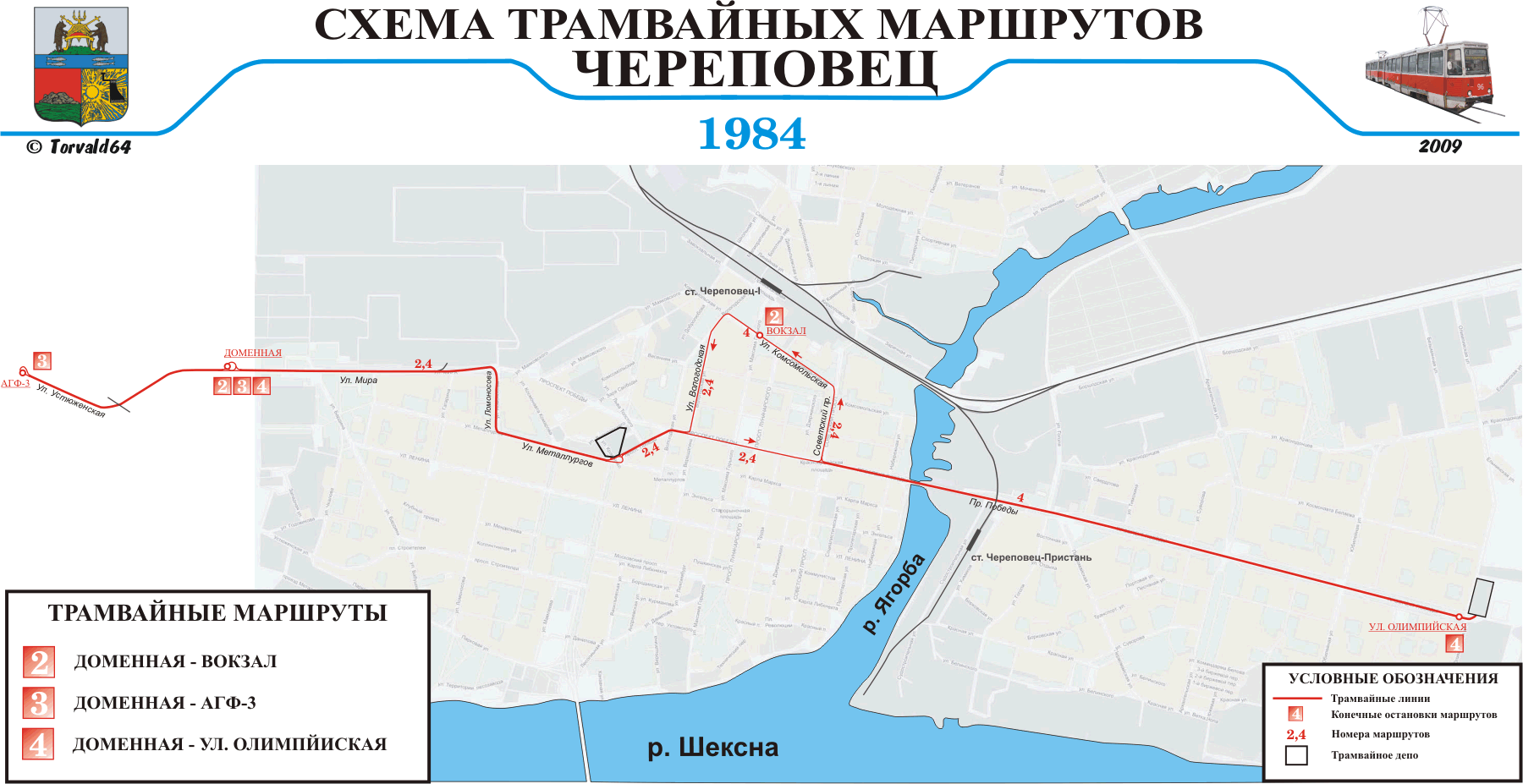 Схема трамвайных маршрутов Череповца 1984 г.